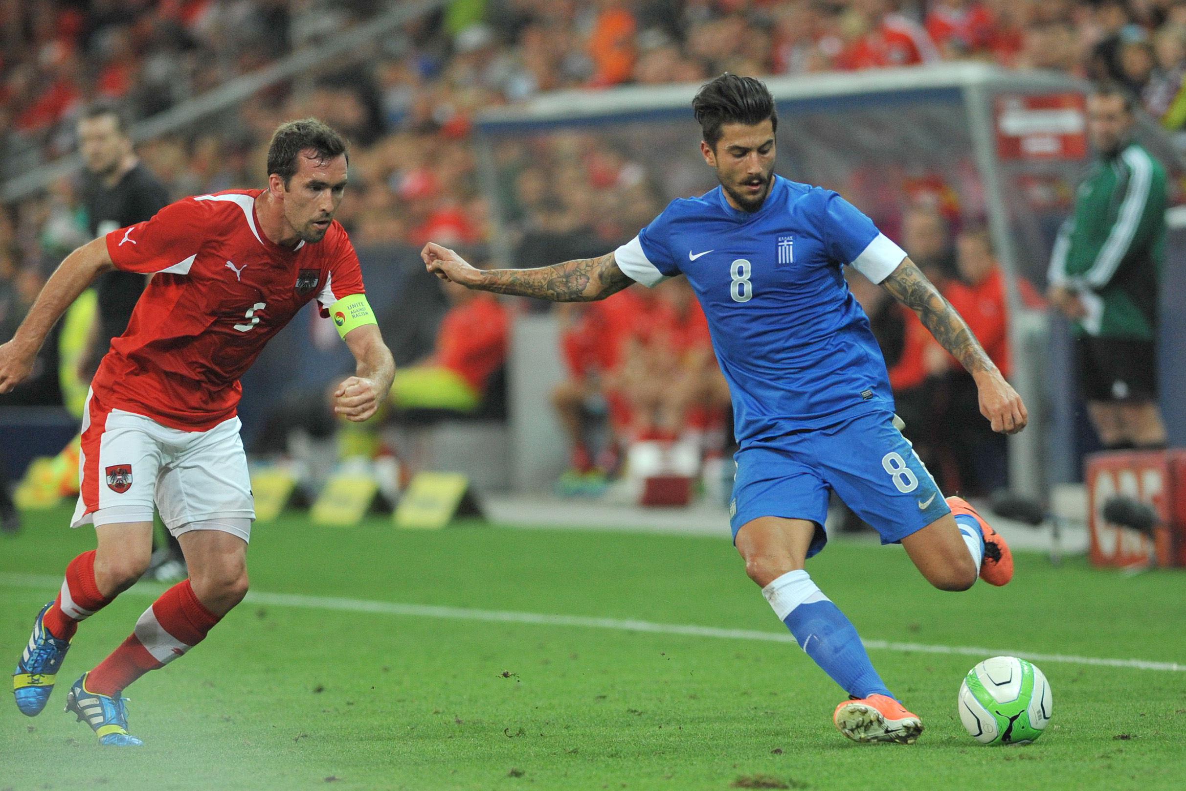 Freundschaftliches Länderspiel Österreich - Griechenland am 14. August 2013 in Salzburg: Panagiotis Kone, Christian Fuchs